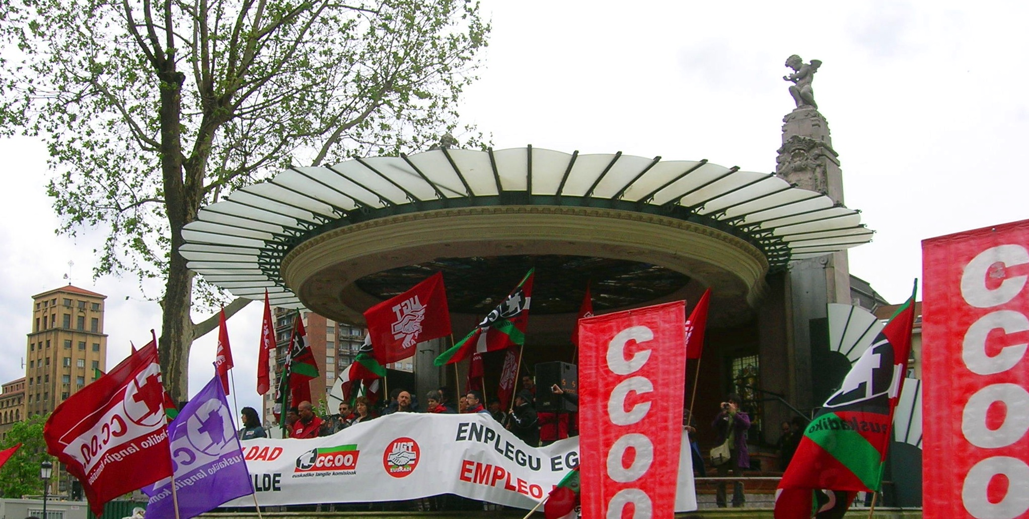 Mitin conjunto de Comisiones Obreras CCOO y Unión General de Trabajadores UGT en la Pérgola del Arenal de Bilbao